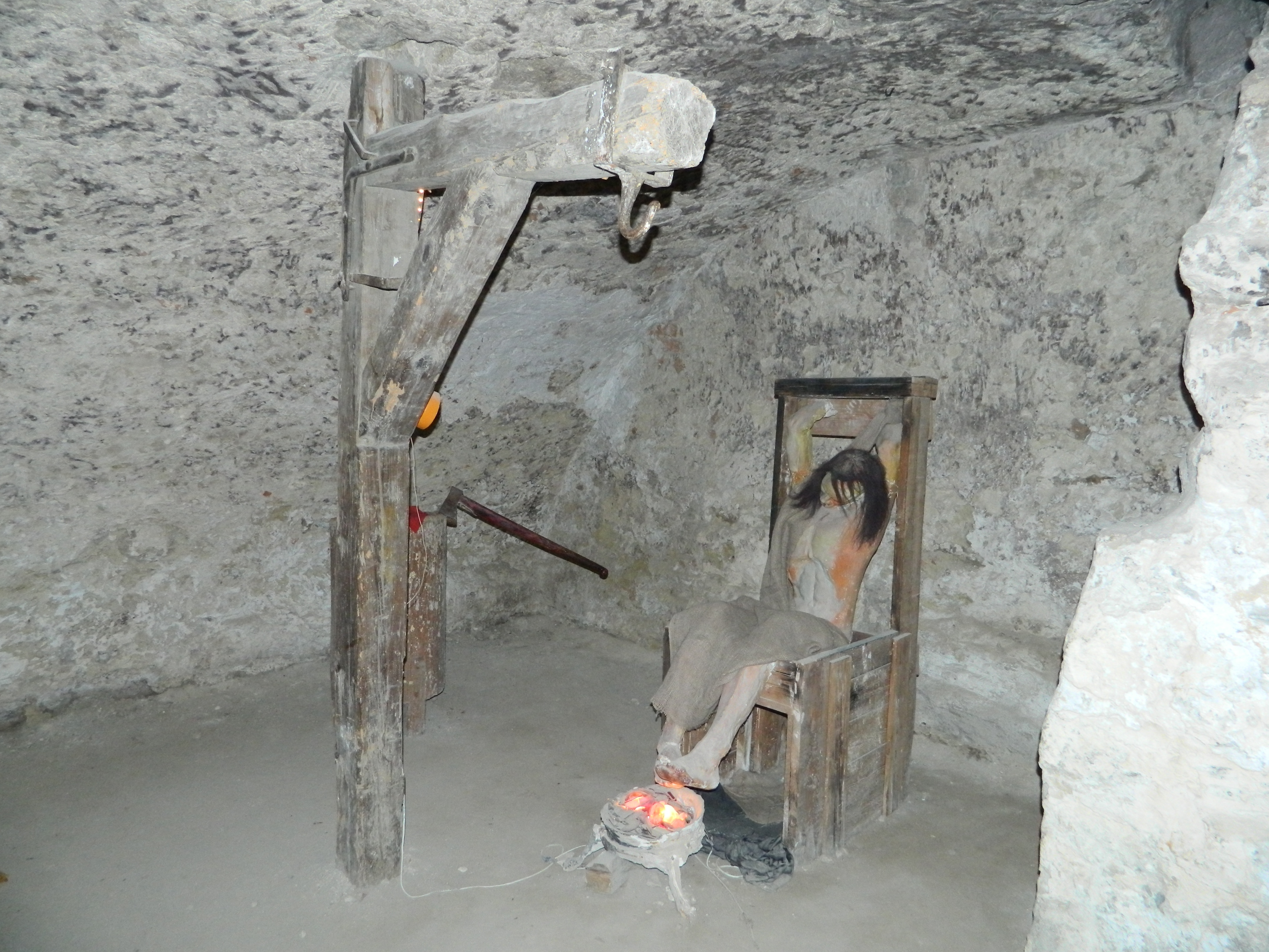 Подвалы монастыря